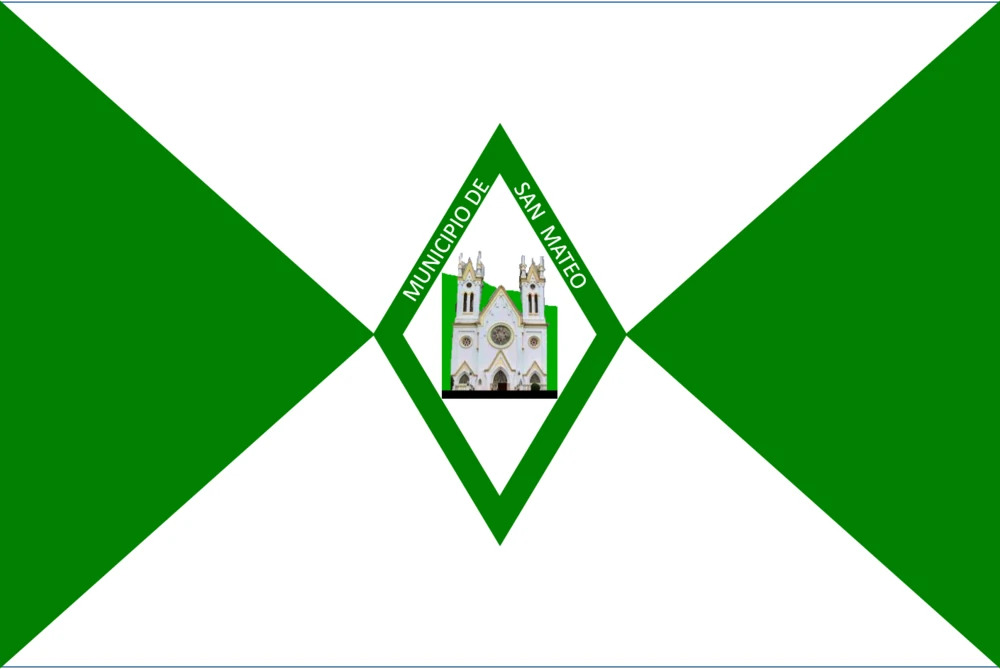 bandera de san mateo boyaca-colombia